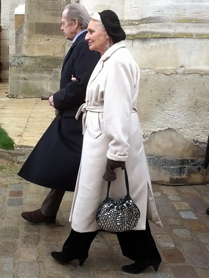 A l'occasion des 800 ans de la naissance et du baptême de Saint-Louis à Poissy.